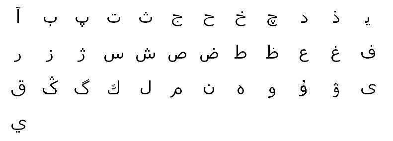 Башкирский алфавит (1915-1923)